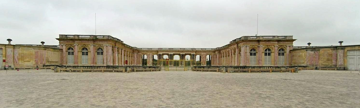 Panorama Grand Trianon - Château de Versailles